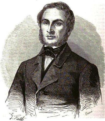 Rouher.